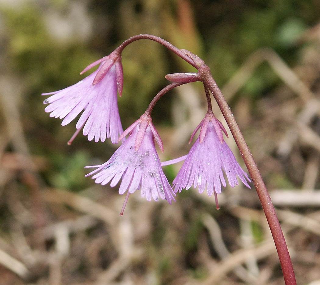 Soldanella alpina, Berchtesgadener Alpen, Germany